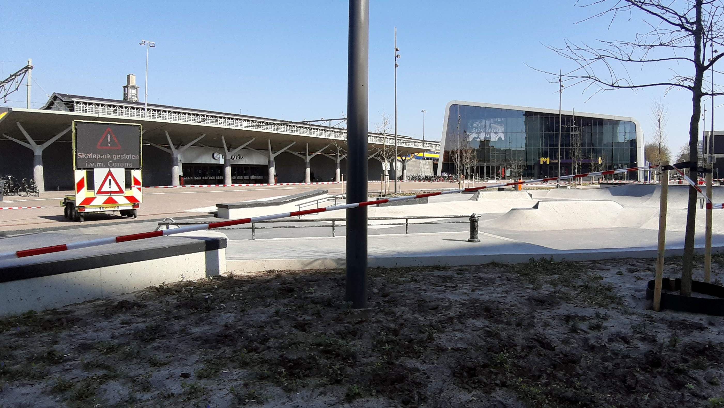 Vanwege Covid-19 is dit skatepark gesloten. Op de achtergrond geeft poppodium Metropool een wens weer "Stay safe and see you soon"